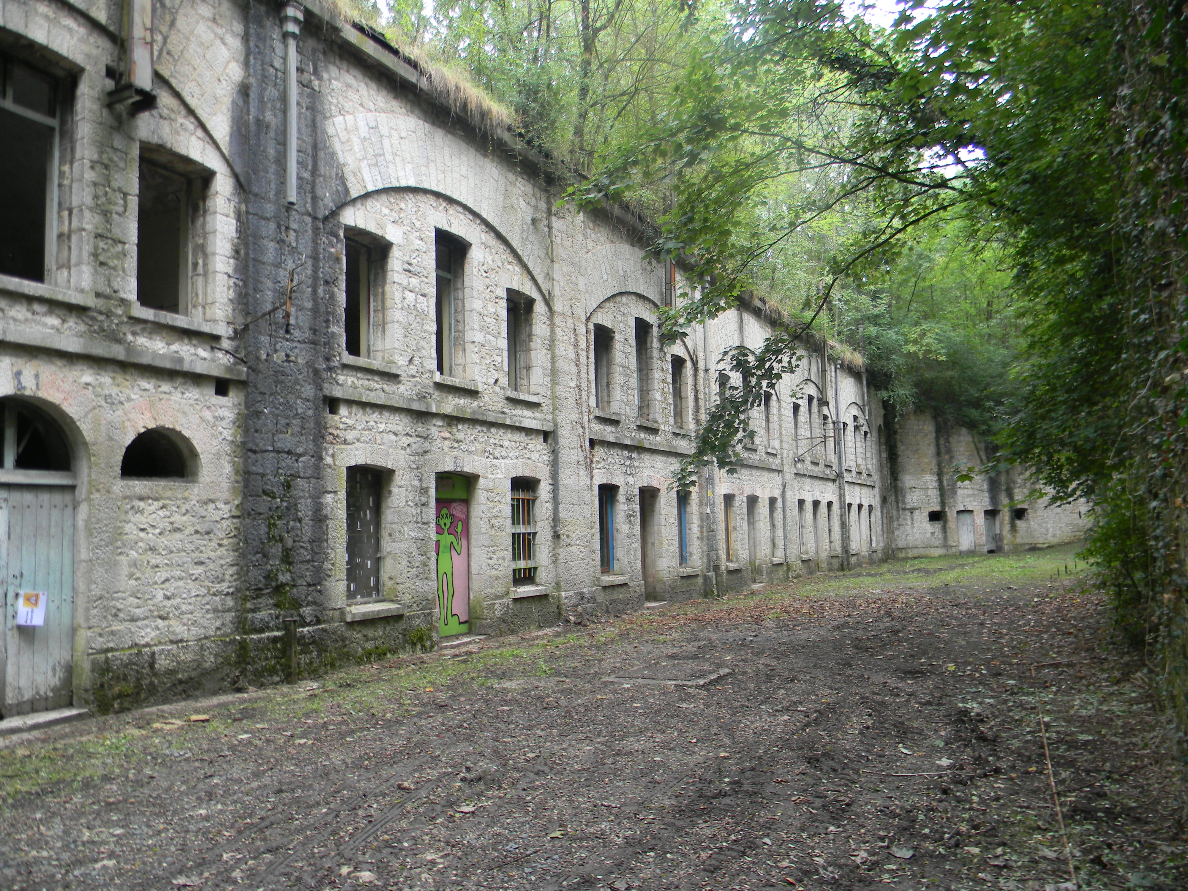 Une caserne au Fort de Vancia: en bas un magasin ou une écurie, à l'étage les chambres.